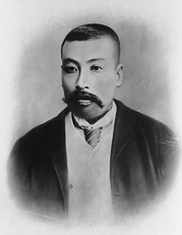 a Japanese man 横川省三 (syôzô Yokokawa)